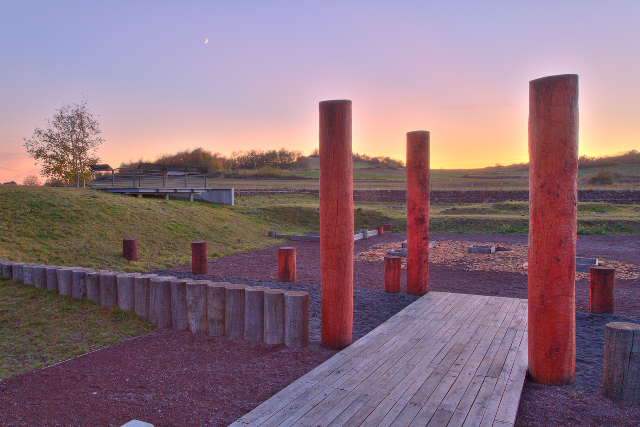 La porte du Sanctuaire Arverne de Corent après le coucher du Soleil et avec le croissant de Lune.